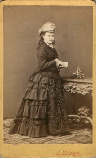 Amalia Krieger (1846-1928) - polish photographer